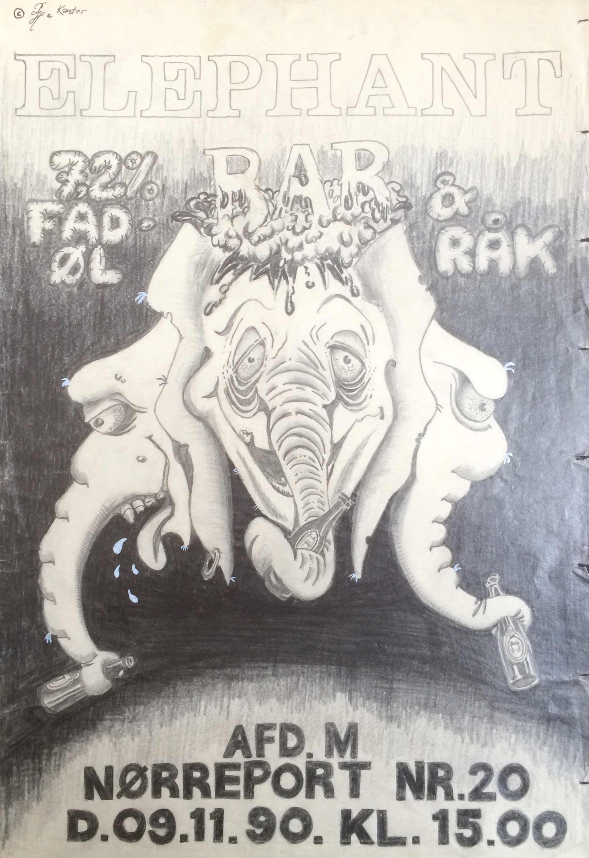 Poster for ElephantBar